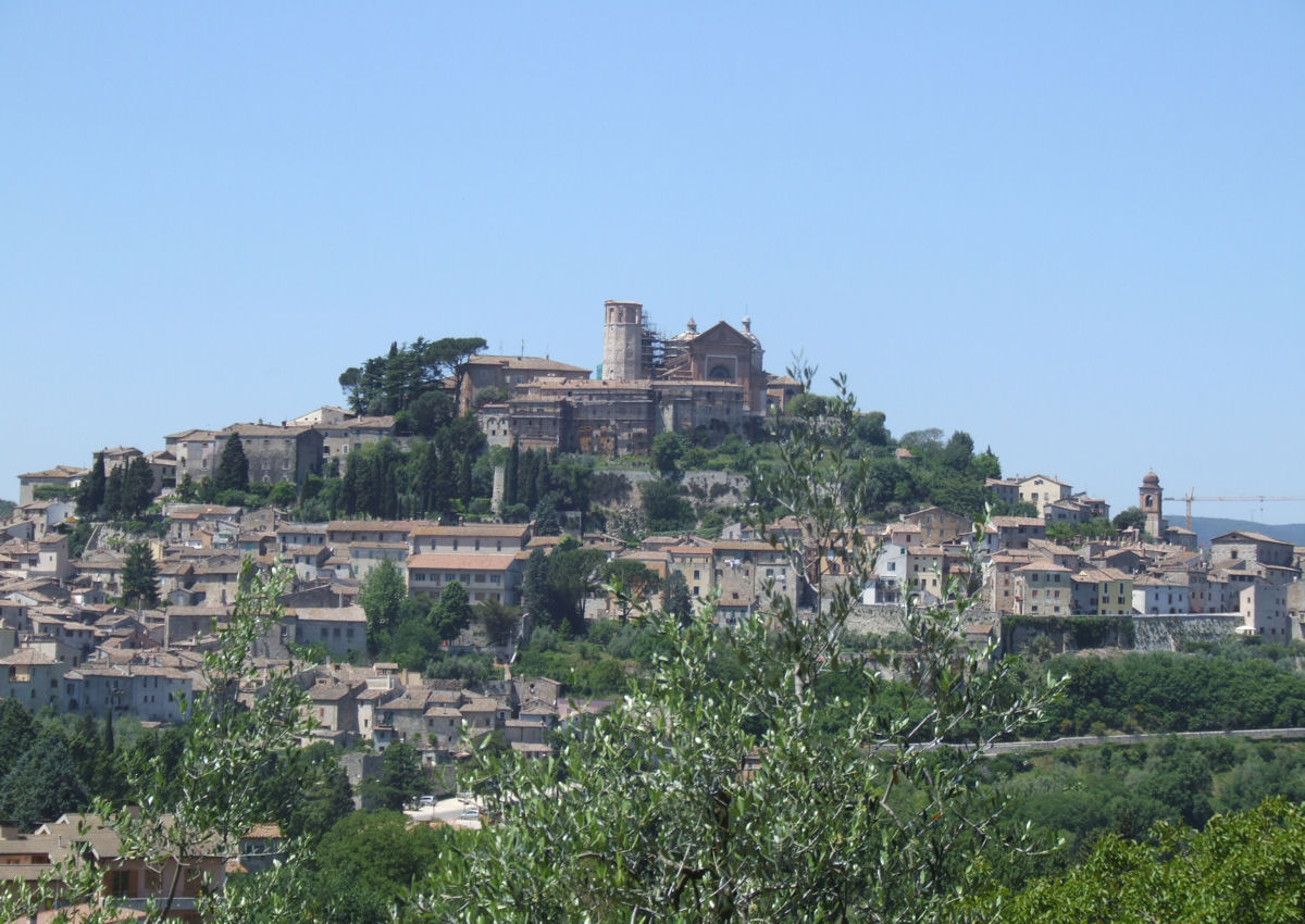 Amelia, Italy